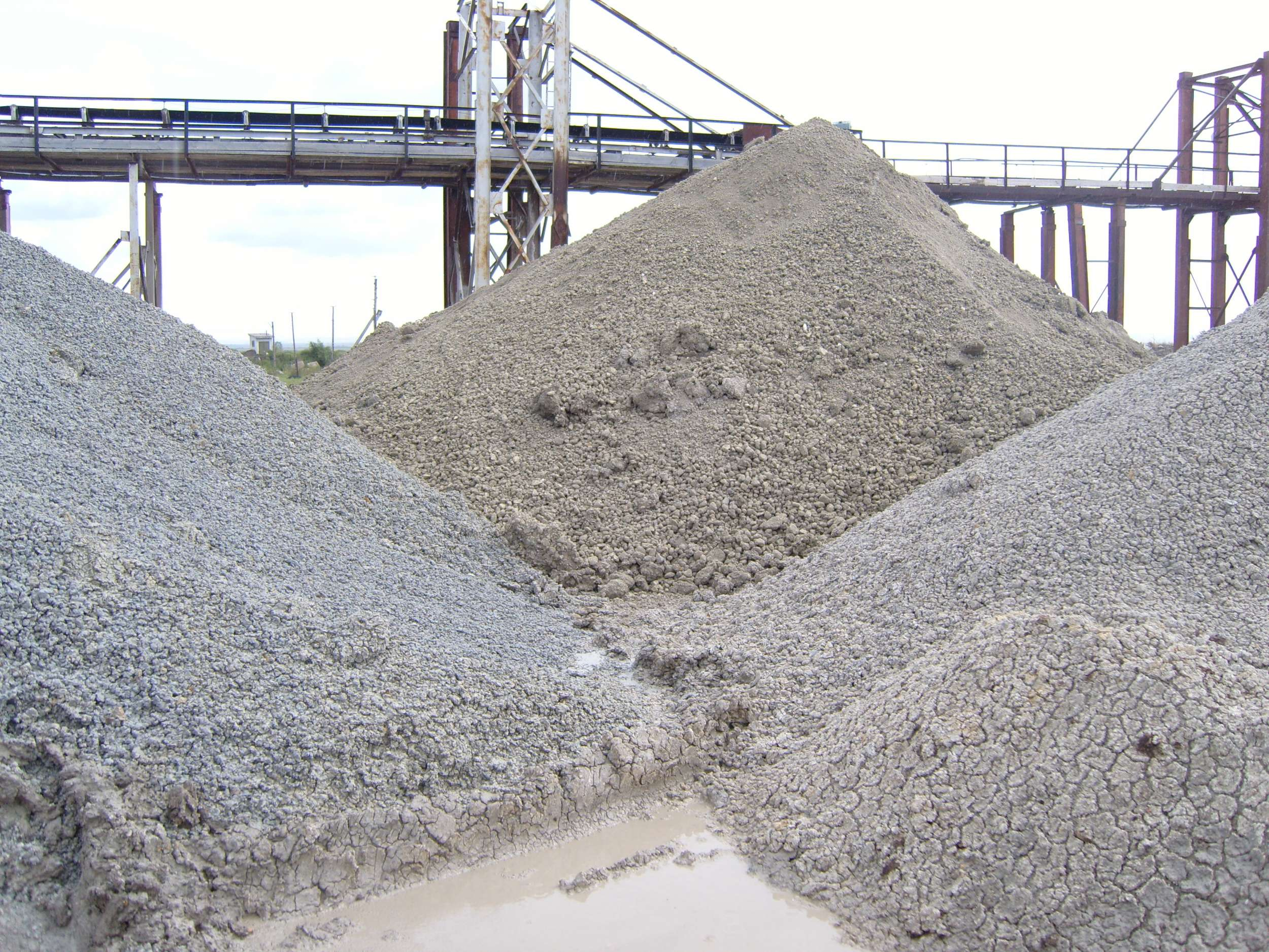 Открытый склад бентонита